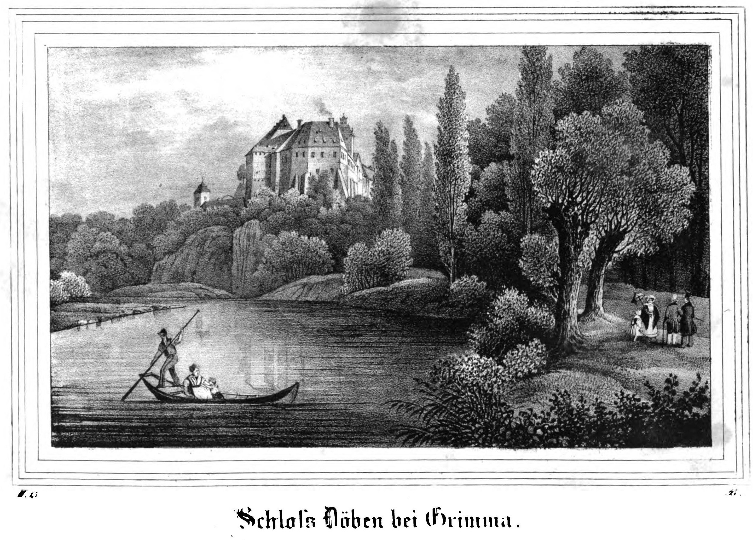 Saxonia Museum für saechsische Vaterlandskunde. Band 2. Dresden: Pietzsch und Comp. Siehe File:Saxonia Museum für saechsische Vaterlandskunde II.djvu